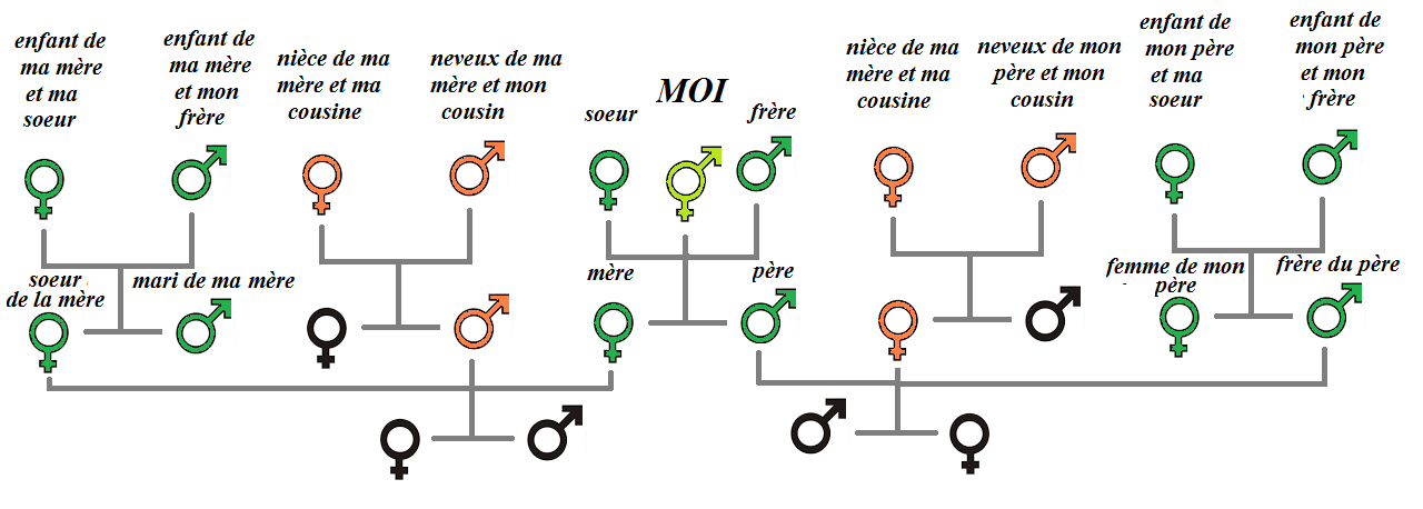 Famille punaluenne selon Lewis Henry Morgan et décrit par Friedrich Engels dans son ouvrage L'origine de la famille, de la propriété privée et de l'État